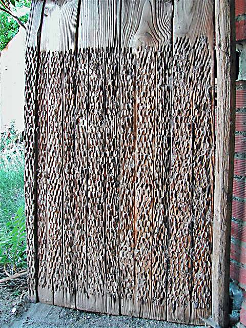 Trillo español, vista inferior